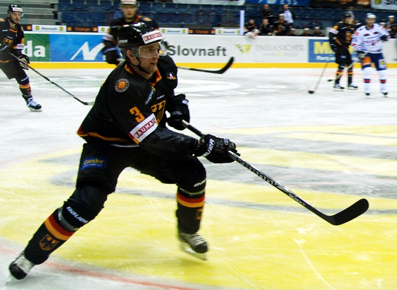 Justin Krueger